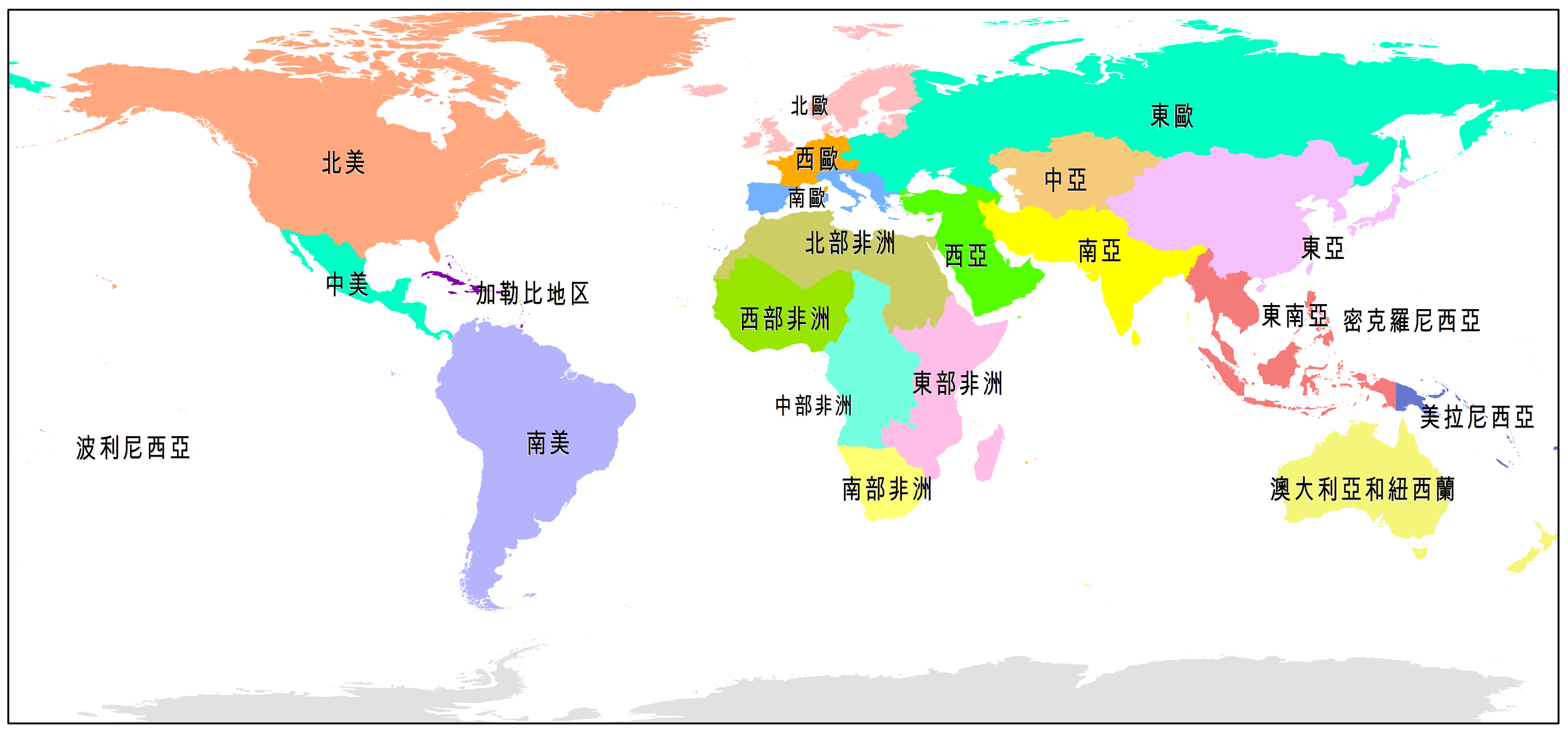 根據聯合國地圖劃分出的地理次區域的世界地圖，地圖邊界檔來源：Template:Link-en。欲再加工原始檔請用此[1]